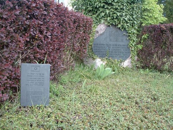 Memorial plaque for former Synagogue, Laupheim